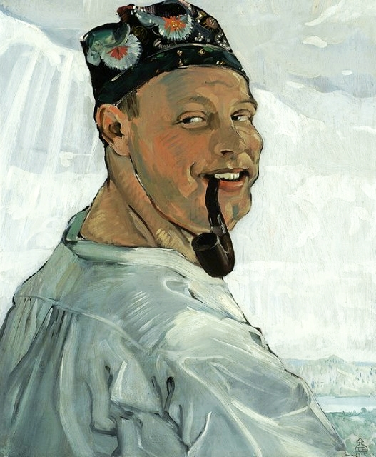 Self-portrait